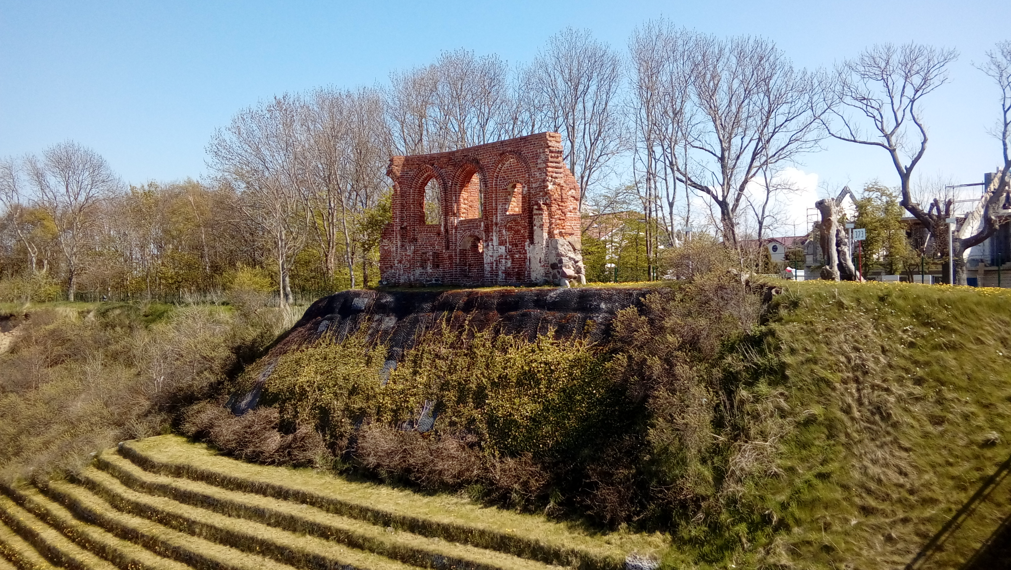 Trzęsacz, ruina kościoła Wikidata has entry Q33251589 with data related to this item.